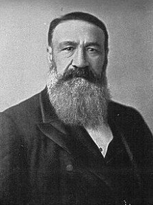 Pjjoubert-224x300